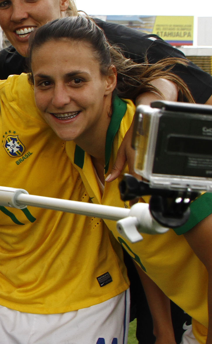 Quito, 28 sep (Andes).- La selección brasileña femenina de fútbol se proclamó Campeona de la Copa América de Fútbol Ecuador 2014. Foto: Micaela Ayala V./Andes